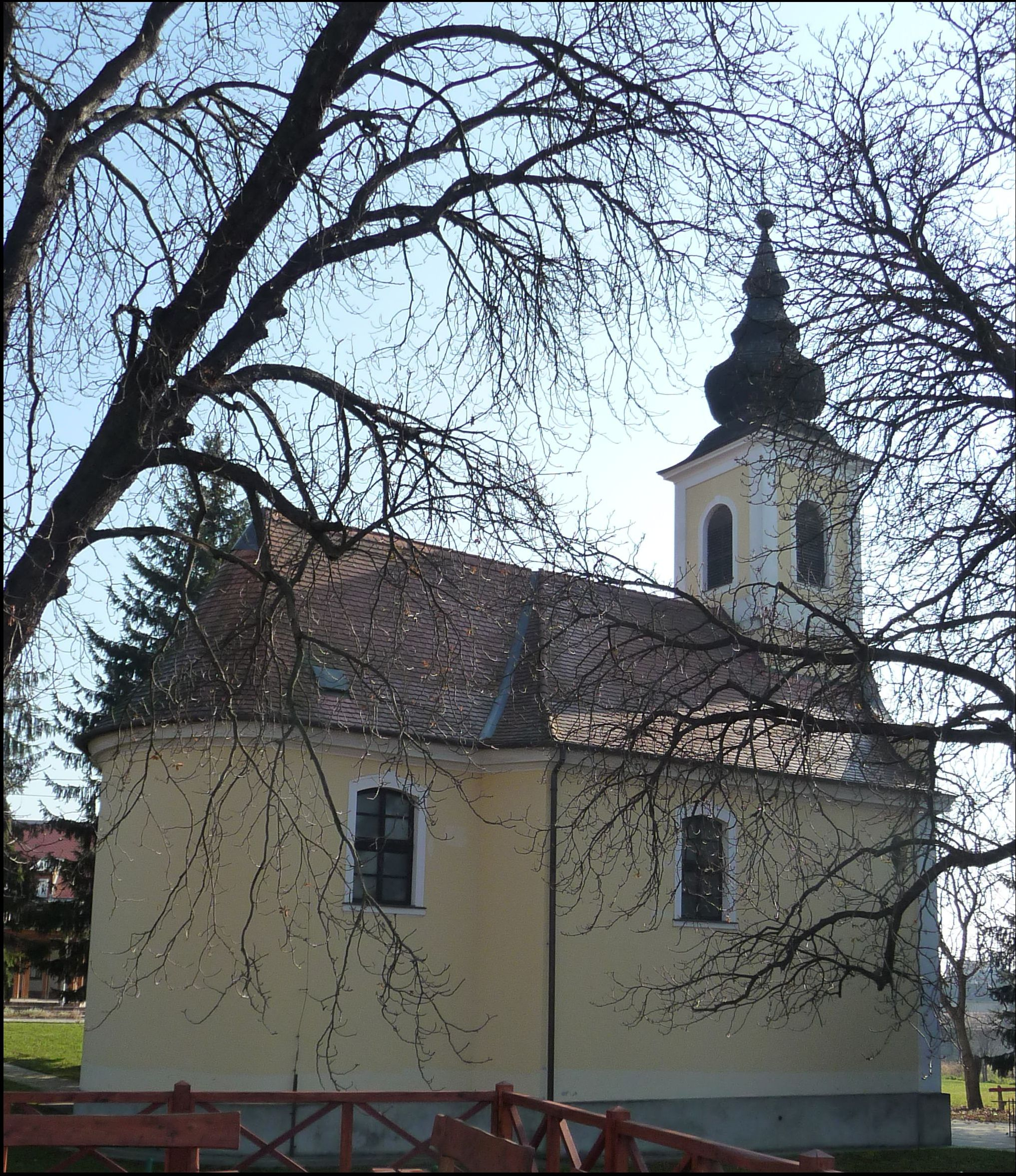 Az aszódi Szentháromság-templom.